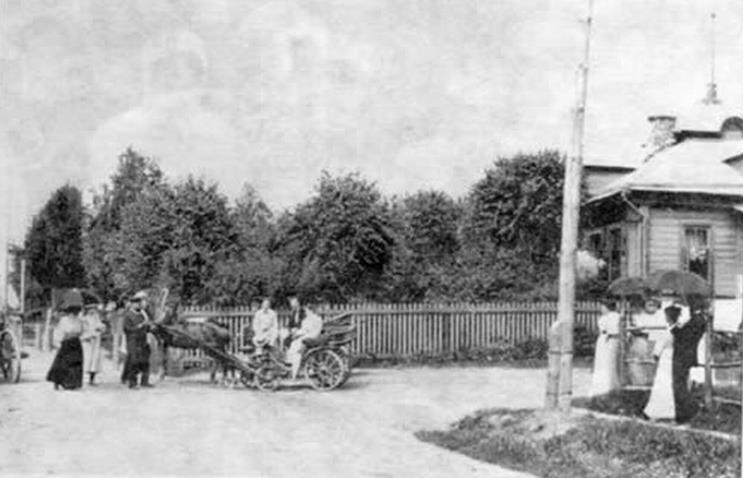 Вид дачного поселка у деревни Давыдково